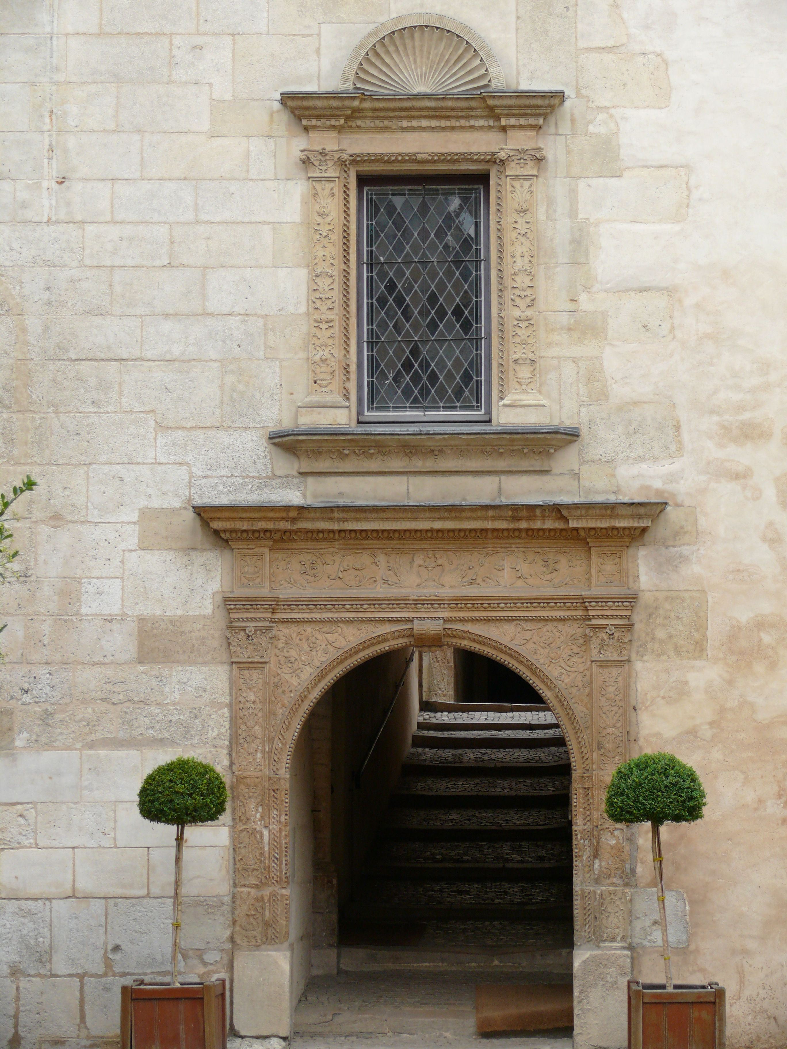 Bourges - Hôtel Lallemant - Façade sur rue - Entrée